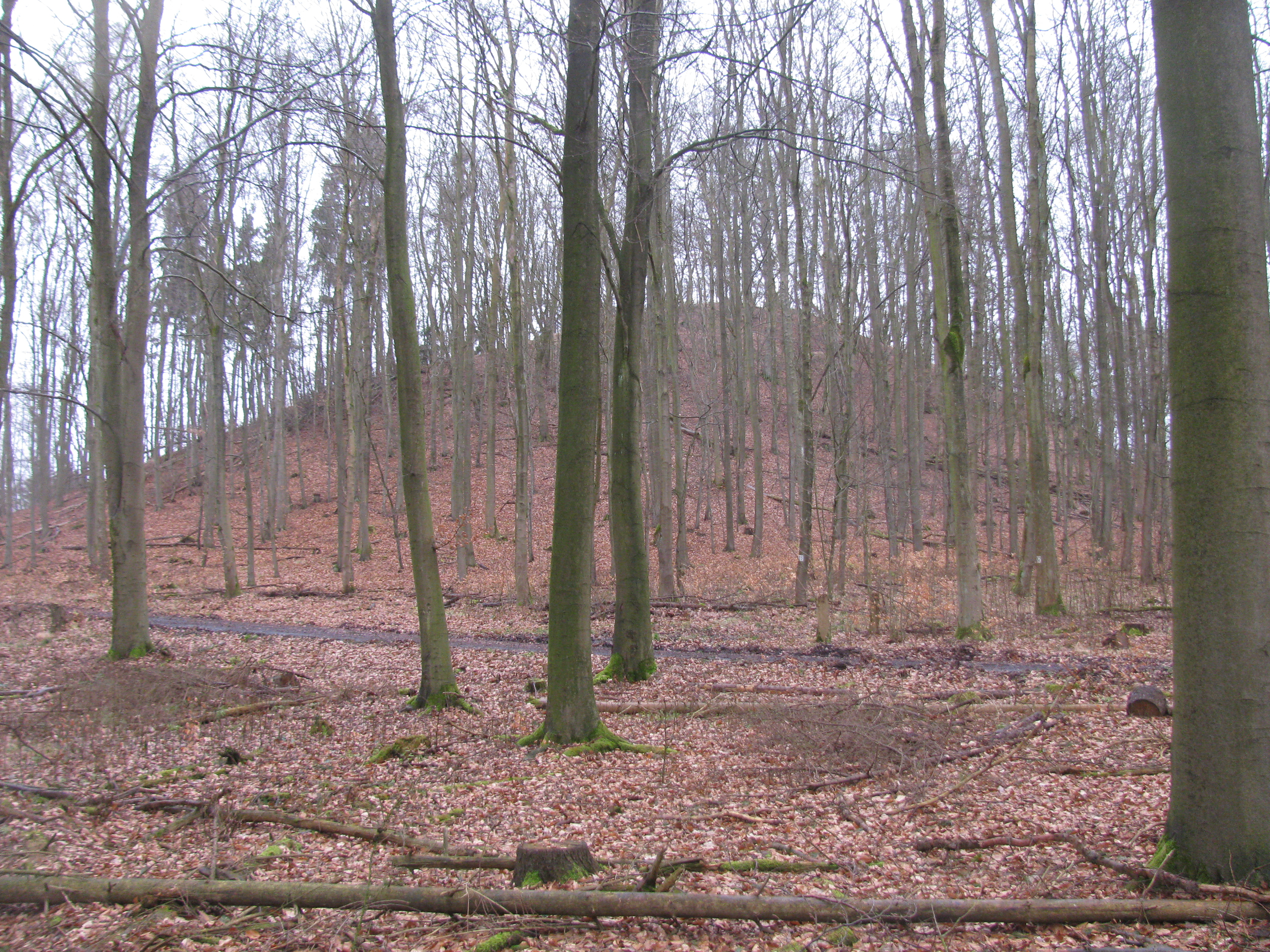 die Kuppe des Staufenberg bei Vellmar